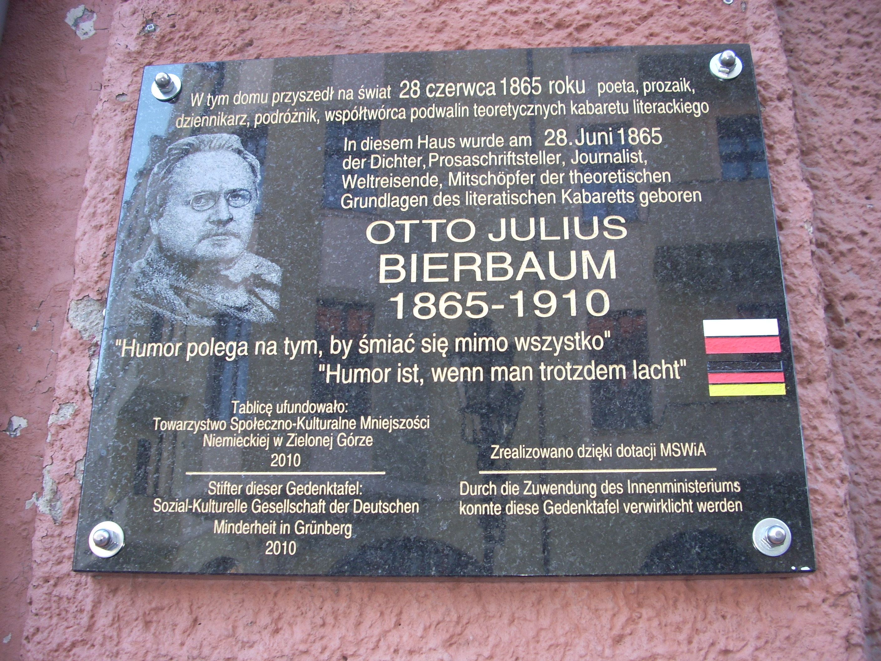 Die Gedenktafel am Otto-Julius-Bierbaum-Geburtshaus an der Kupiecka Straβe 25 in Zielona Góra (eröffnet am 26. November 2010).